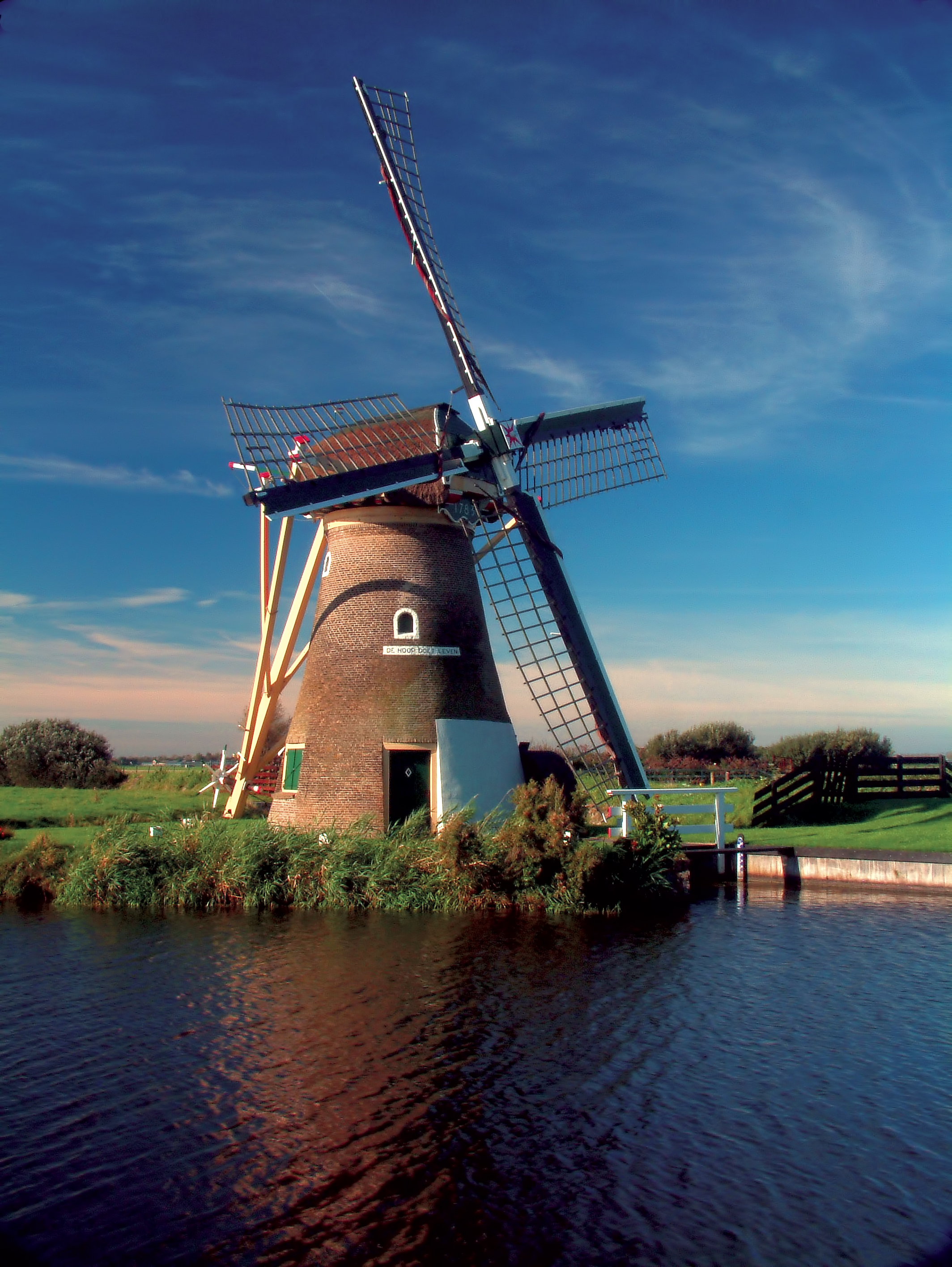 Hoop Doet Leven (Voorhout) Plaats Voorhout Bouwjaar 1783 / 1999 Type grondzeiler Kenmerken ronde stenen molen Vlucht 15,40 m Functie poldermolen